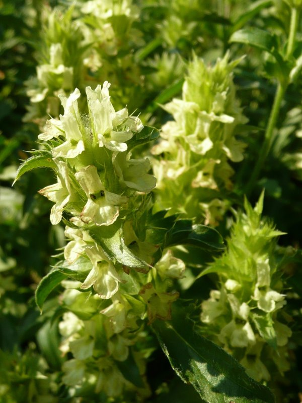 Sideritis endressii, Botanischer Garten Erlangen, 2008